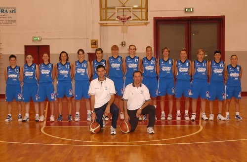 Squadra del Basket Team Crema stagione 2006-2007 Author: EMME3 - Madignano - Italy